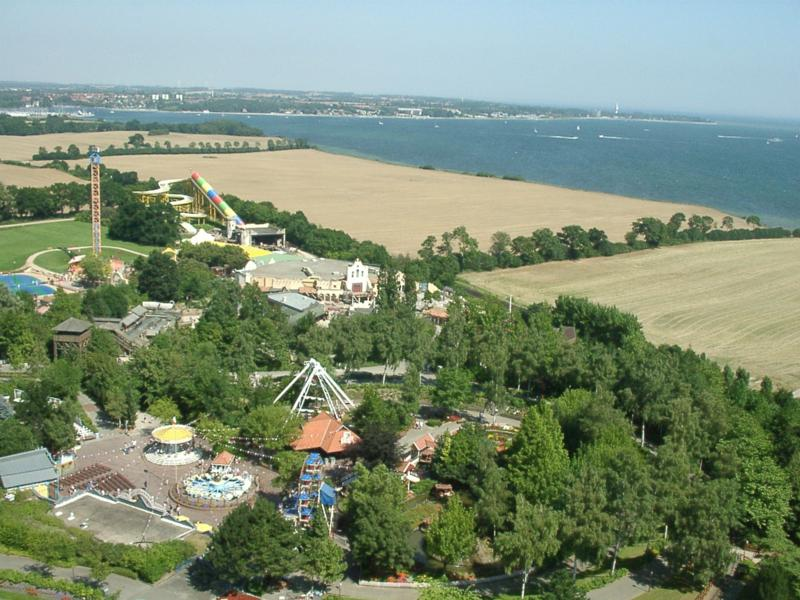 Hansa-Park